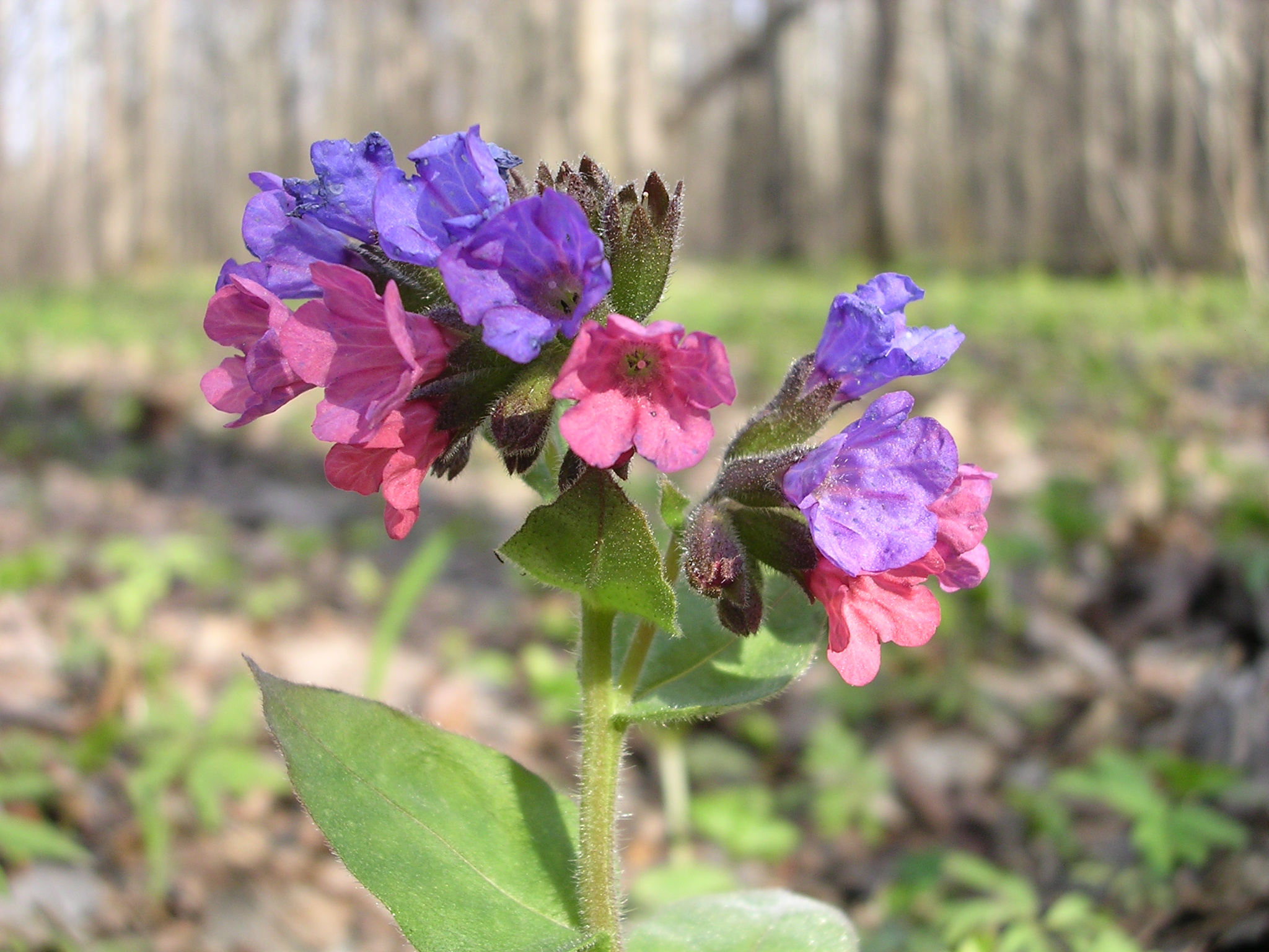 Lungwort